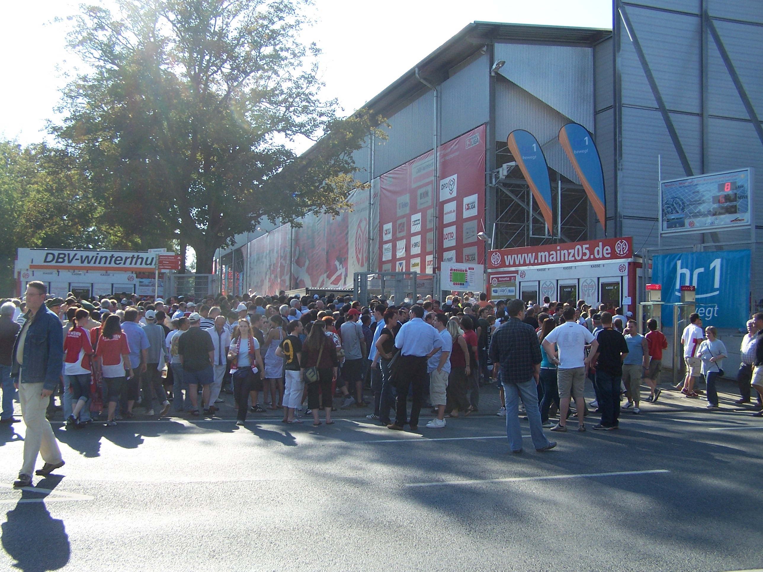 Stadion am Bruchweg in Mainz